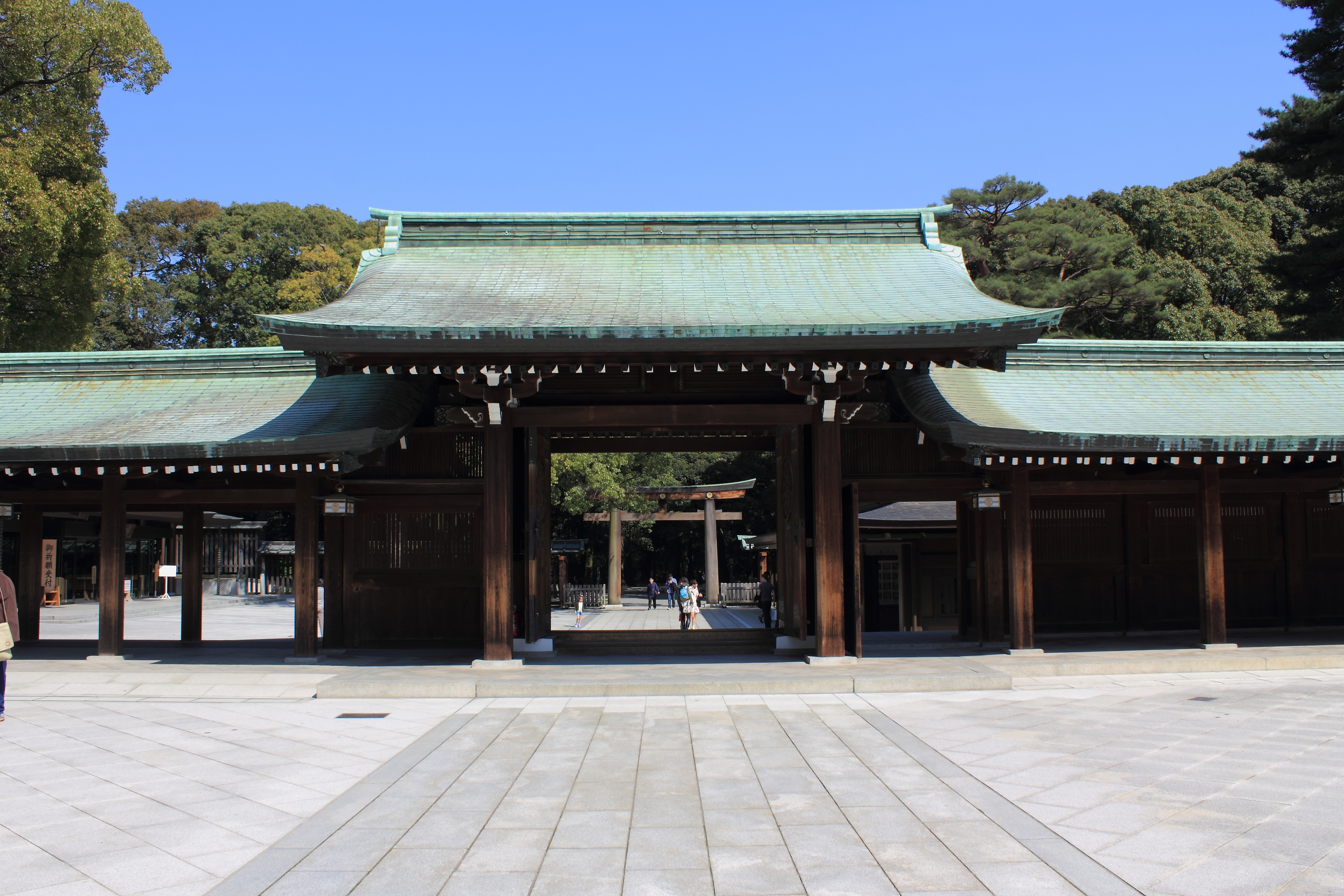 明治神宮（東京都渋谷区）